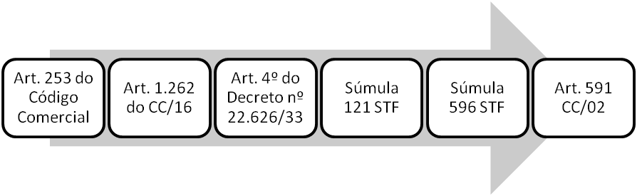 anatocismo linha do tempo